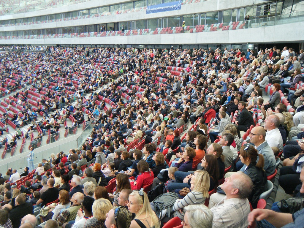 Trybuny Stadionu Narodowego w Warszawie.